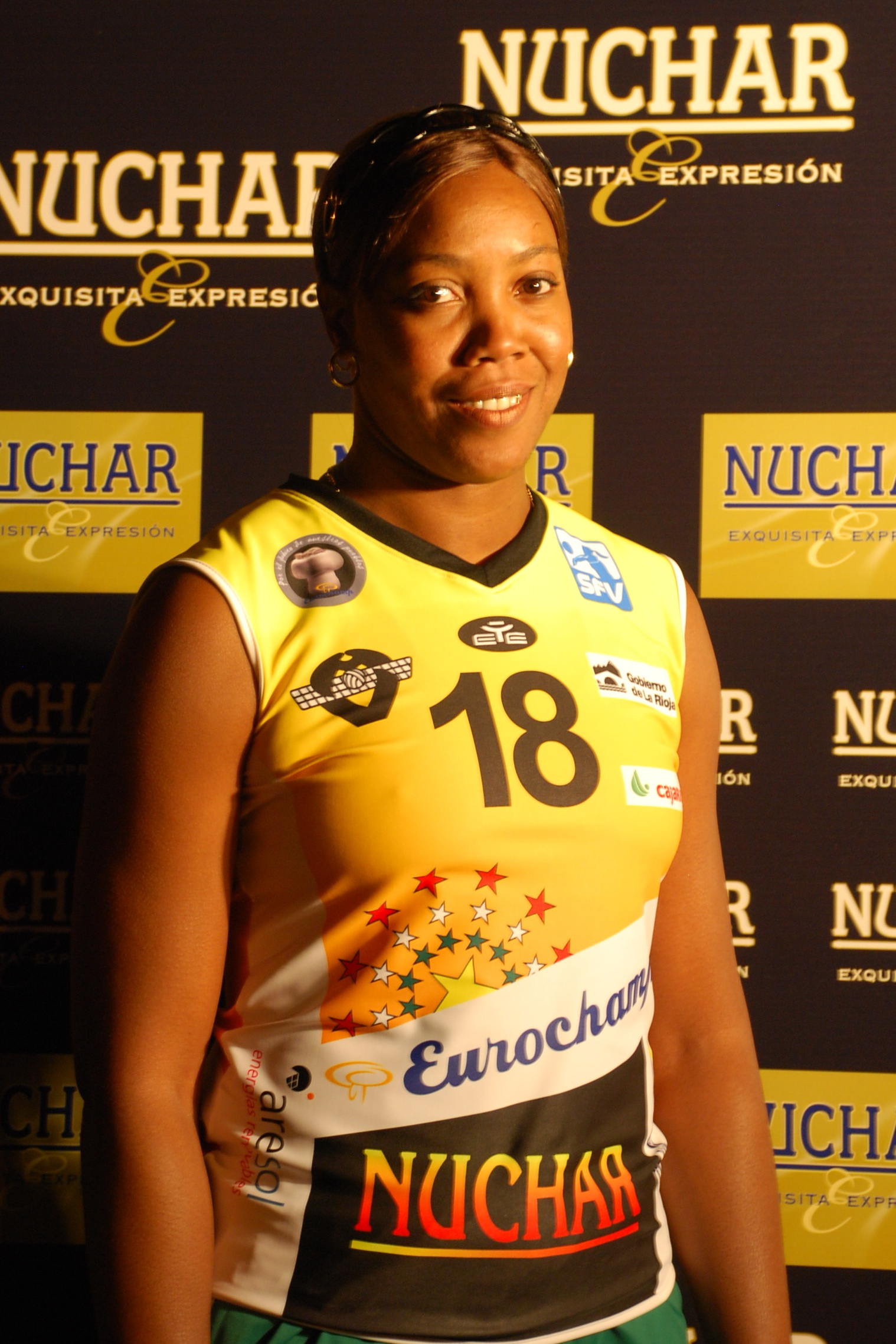 Regla Bell, jugadora cubana de voleibol, temporada 2011-2012.